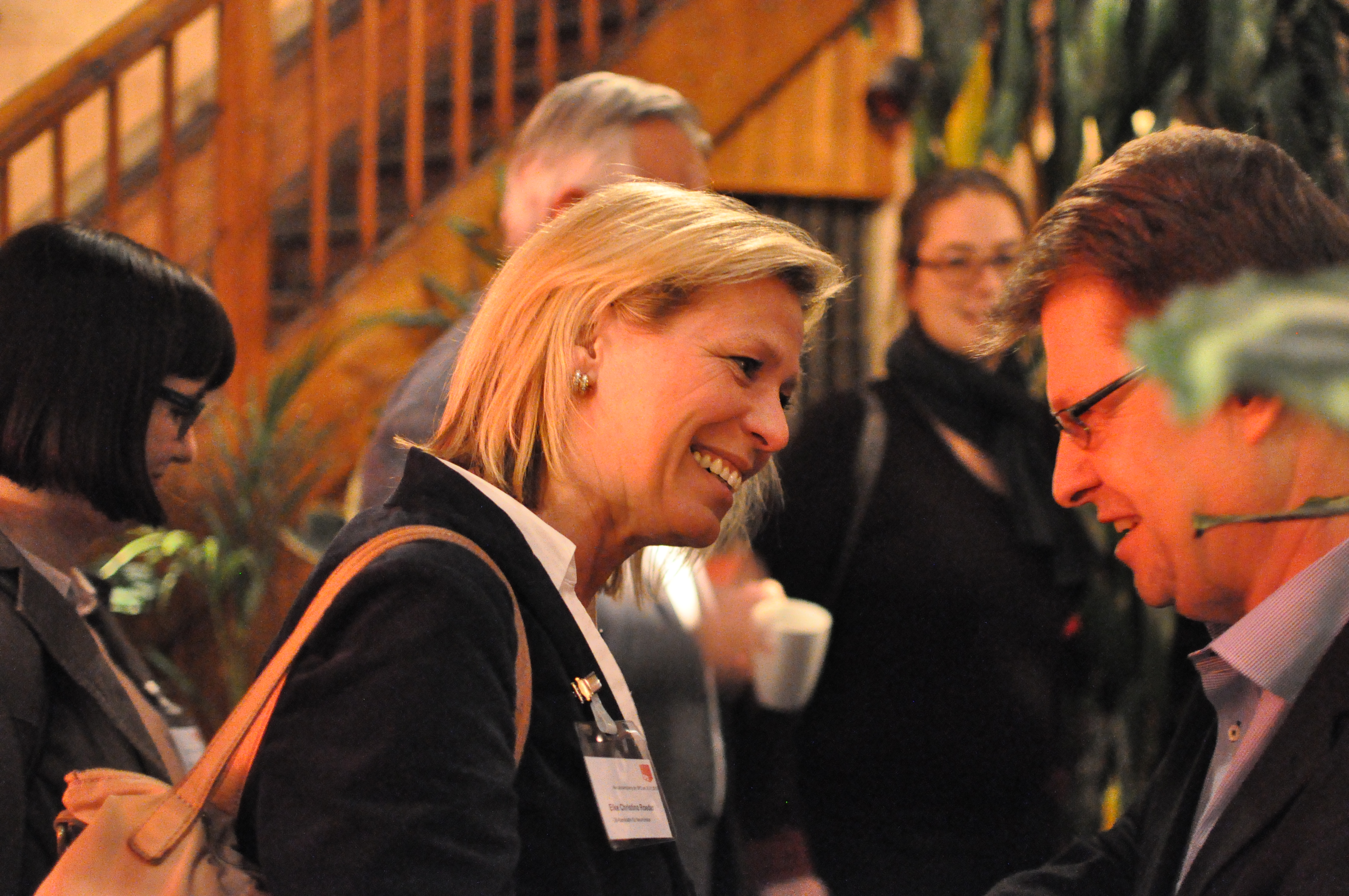 SPD Kandidatin für das Oberbürgermeisteramt in Neumünster